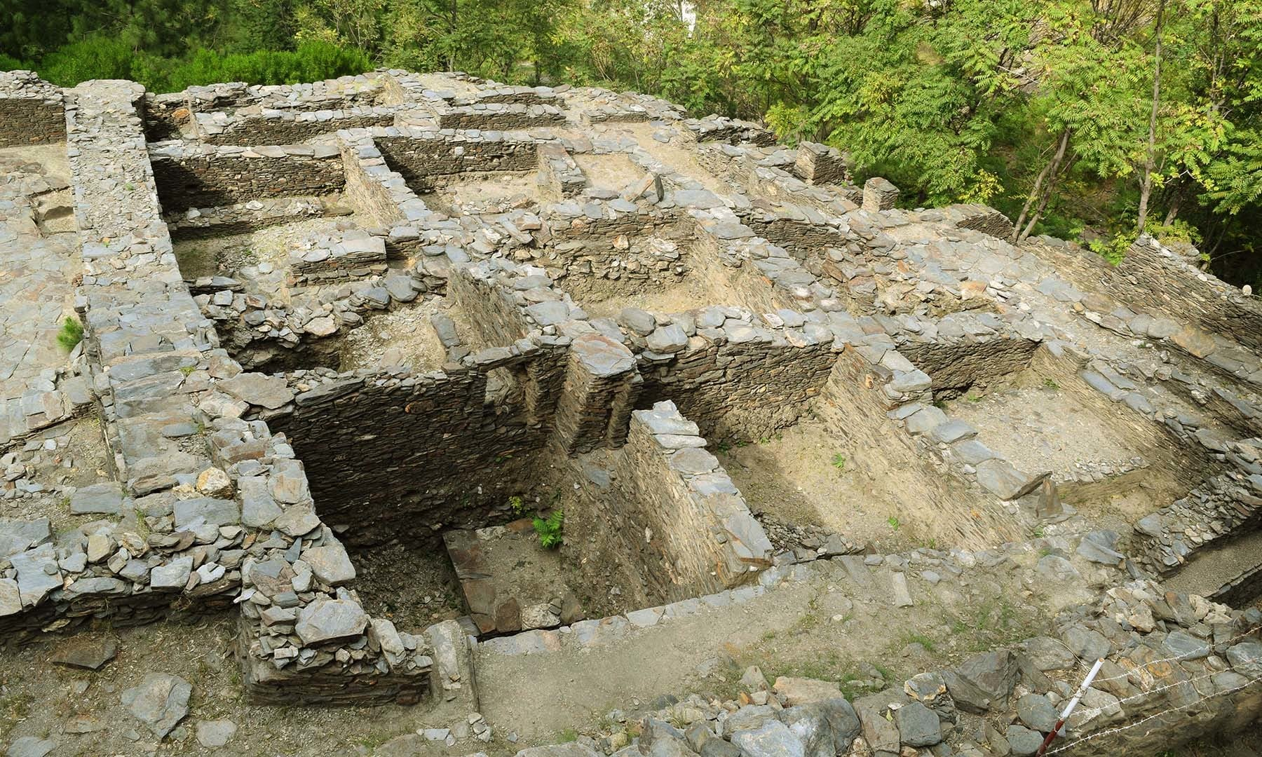 پښتو: Mehmood Ghaznavi Masjid,Odigram Swat